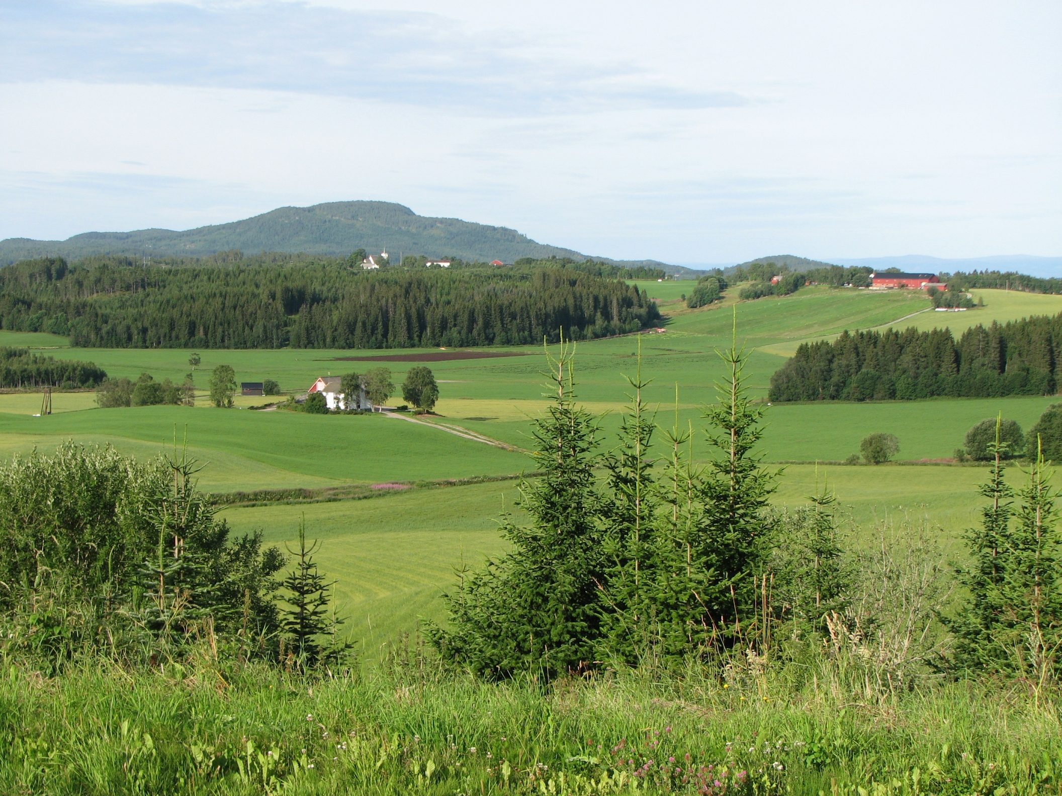 Skei fra Røysing.